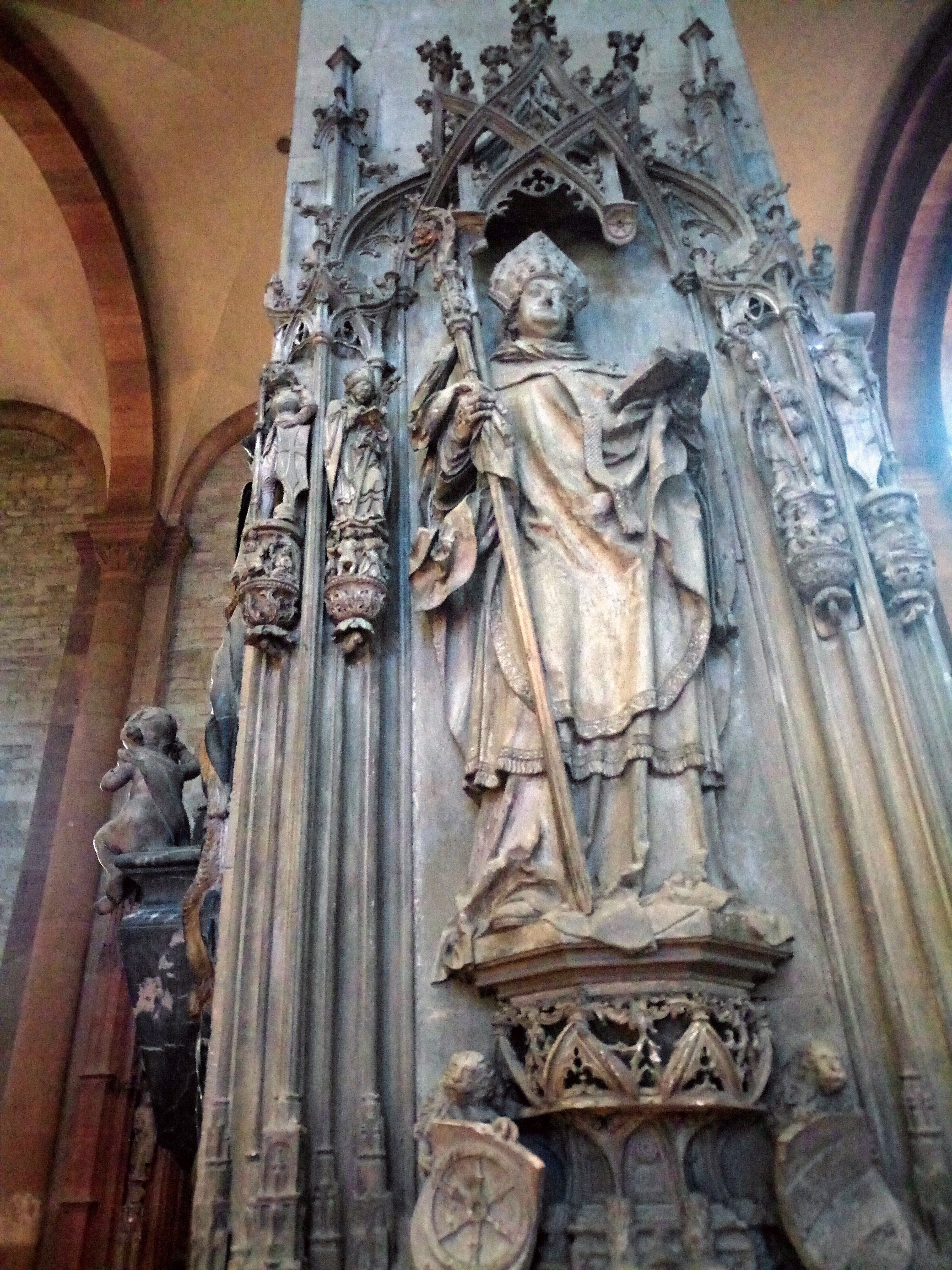 Mainzer Dom, Grabdenkmal Bischof Jakob von Liebenstein (+ 1508), geschaffen von Hans Backoffen